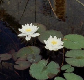 Weisse Seerosen. Foto von Jakob Vetsch, 1991.